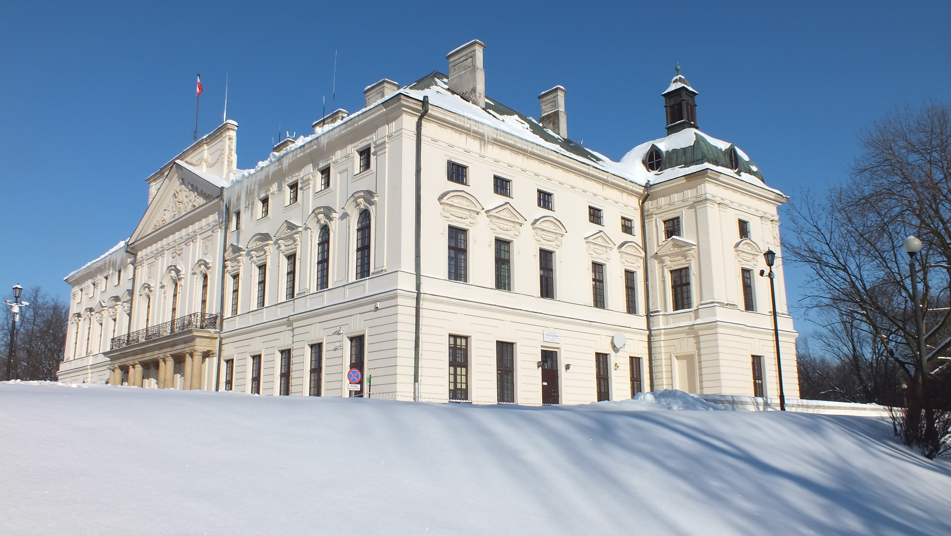 Lubartów, pałac